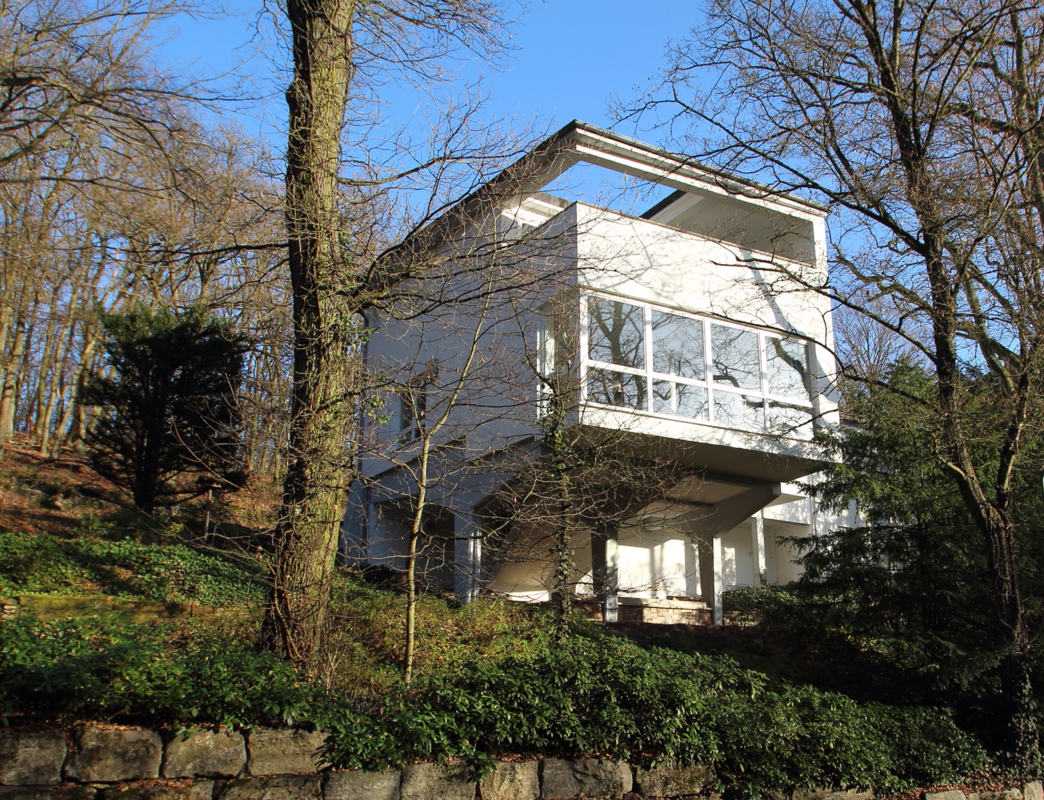 Haus Kampschulte, erbaut 1960. Architekt: Johann Wilhelm Lehr. Wiesbaden.